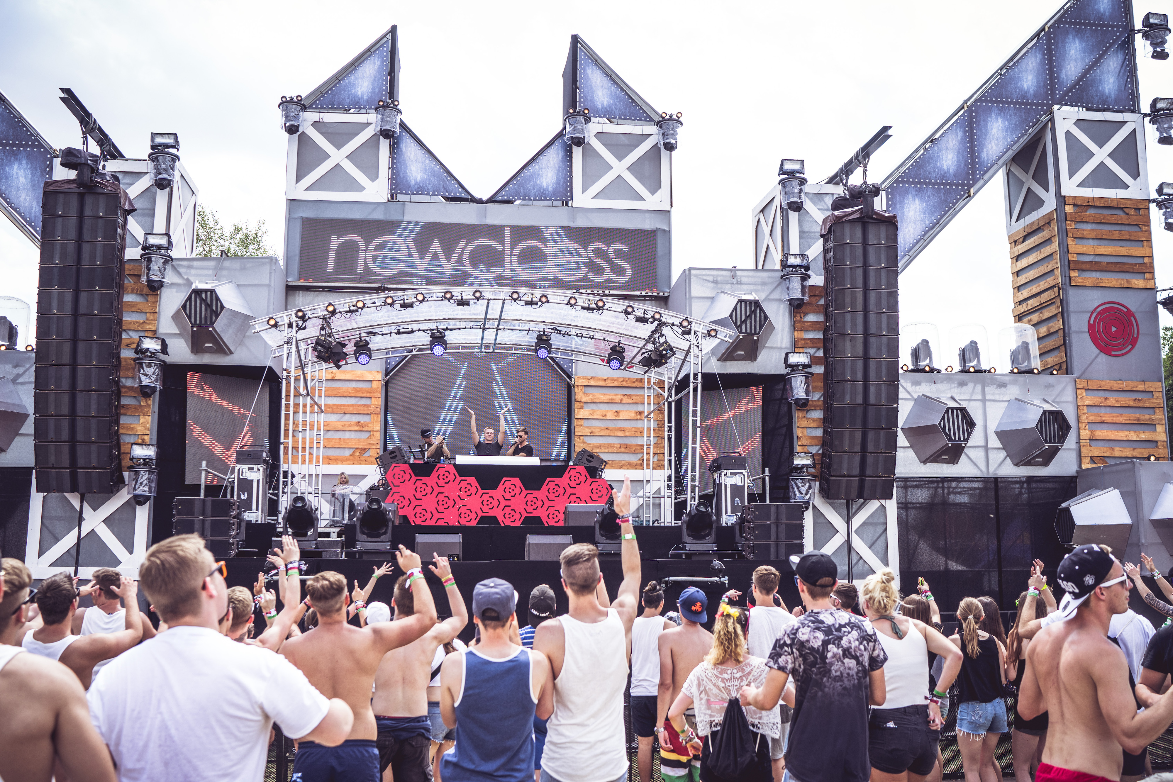 Auftritt mit erstem offiziellem Logo